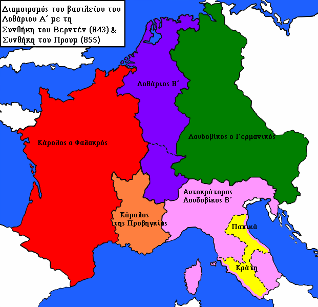 Ο διαμοιρασμός του βασιλείου του Λοθαριου Α΄ με τη συνθήκη του Βερντέν και του Προυμ